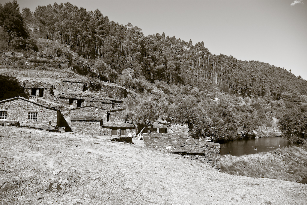 Góis, Agosto 2007